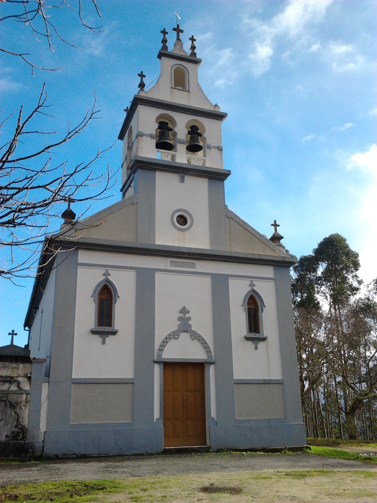 Igrexa de Santa Marta de Babío, no concello de Bergondo.